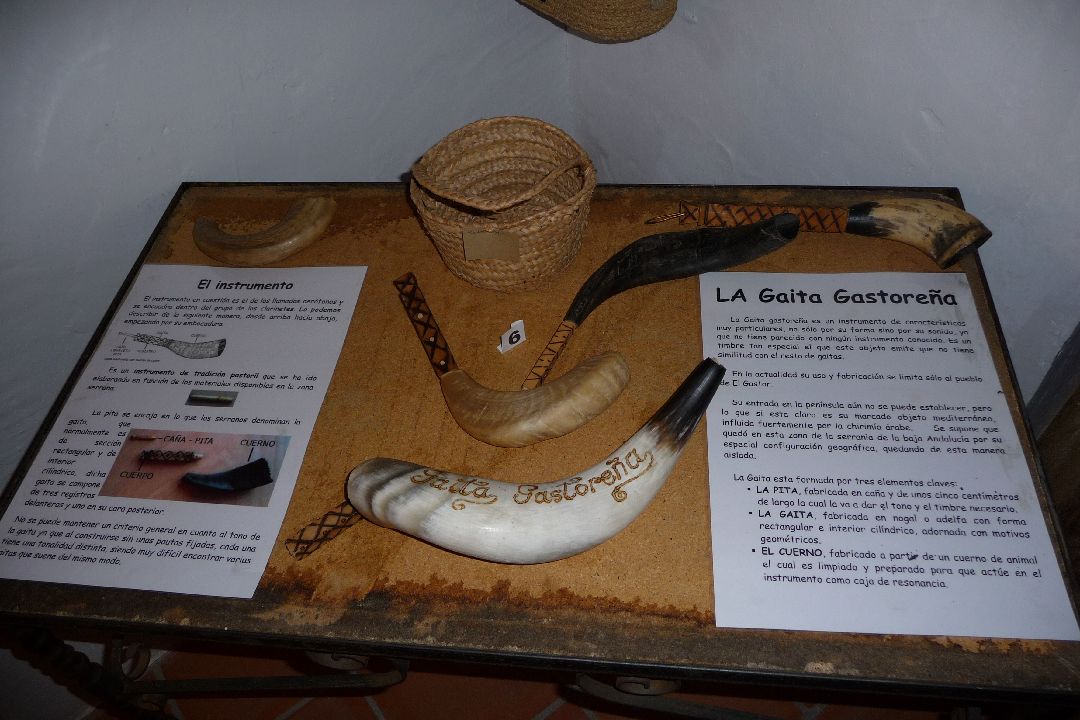 El Gastor (Andalusia, Spain).